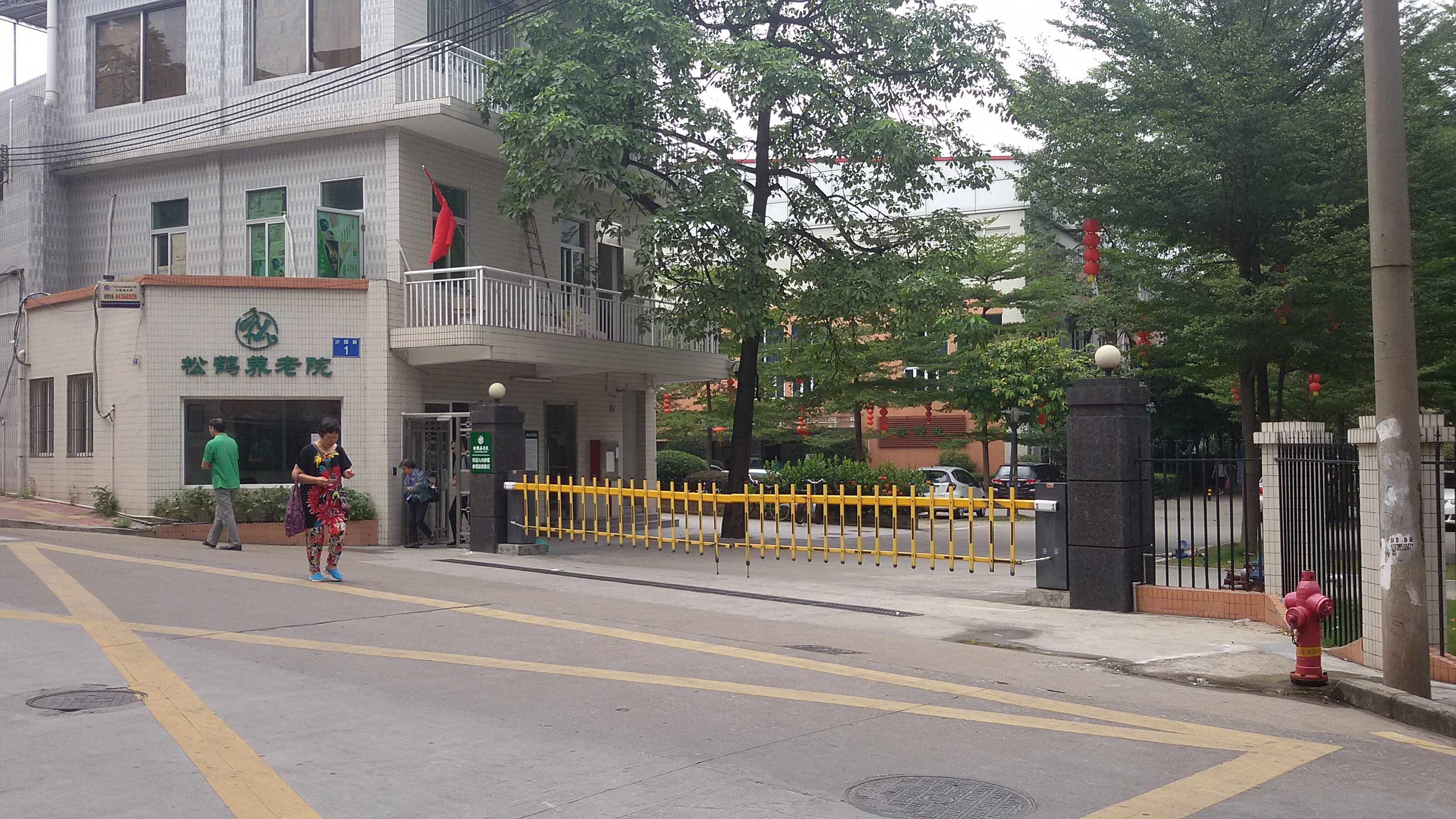 粵語: 廣州松鶴養老院